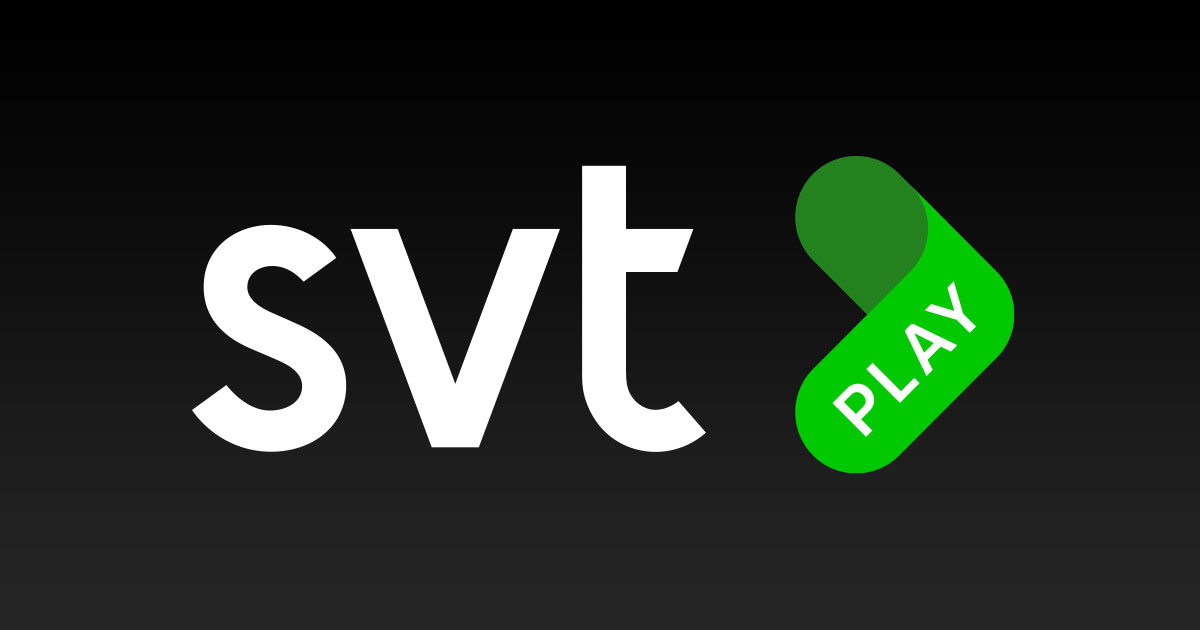 Logotyp för SVT Play.